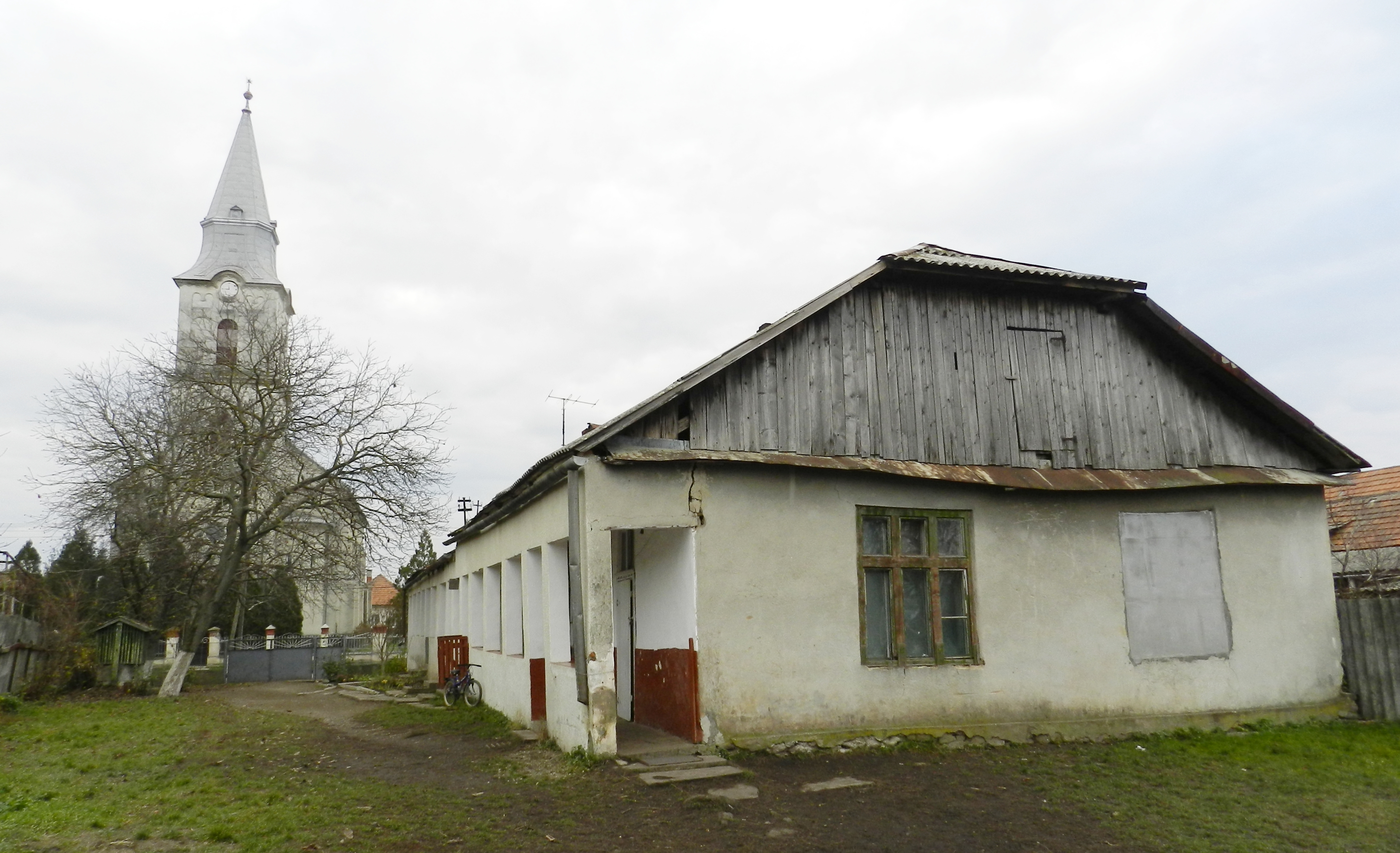 Колишня церковна школа, нині - корпус ЗОШ